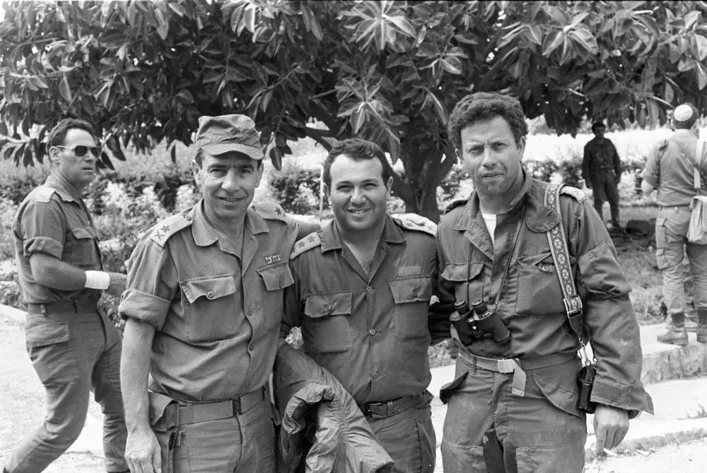 יוסי בן חנן - לידו מאיר דגן, חיים נדל ובצד עמוס ירון. מלחמת שלום הגליל.